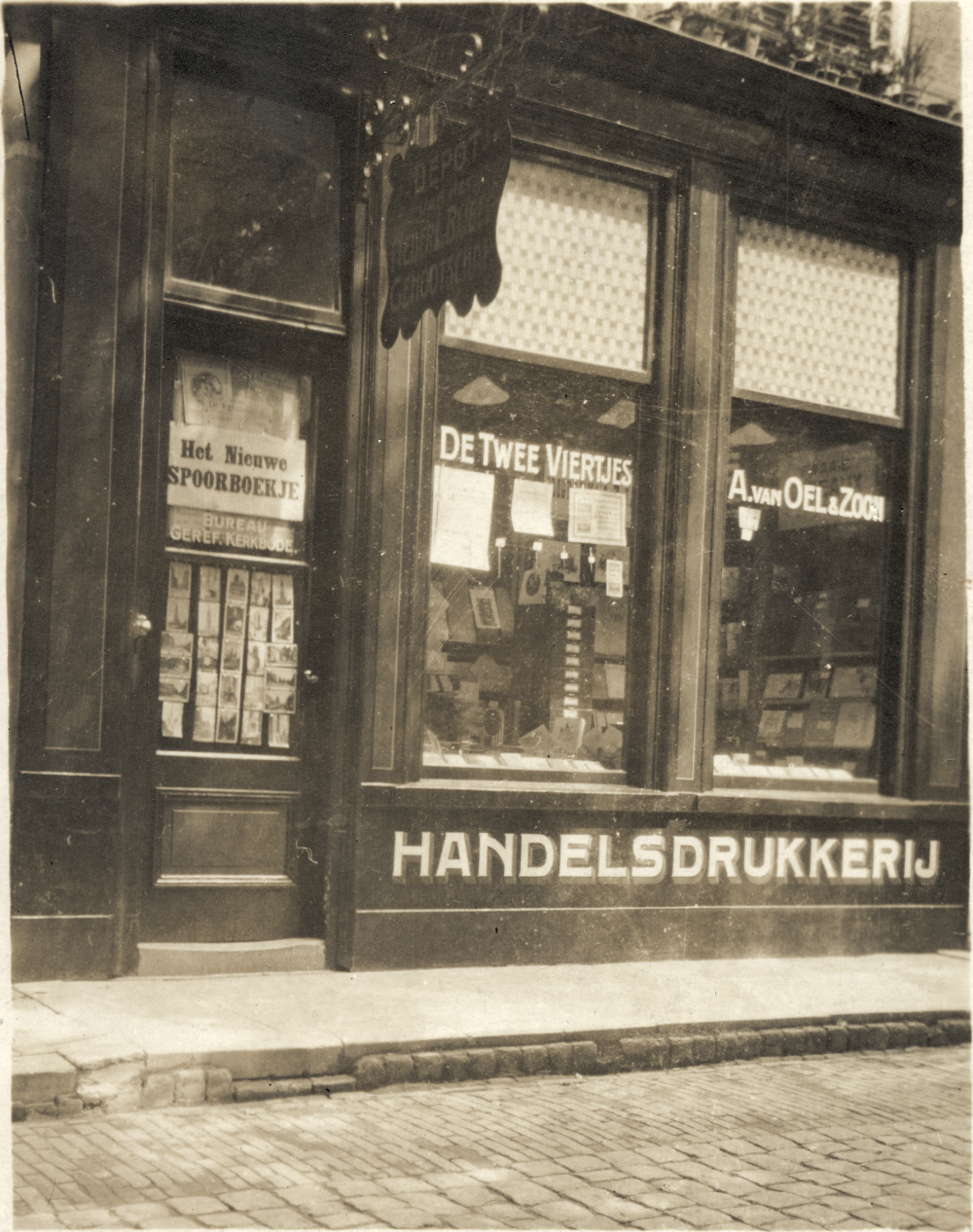 Dit is een afbeelding van een monochrome foto van de drukkerij "De twee viertjes" van Arie van Oel en Zoon